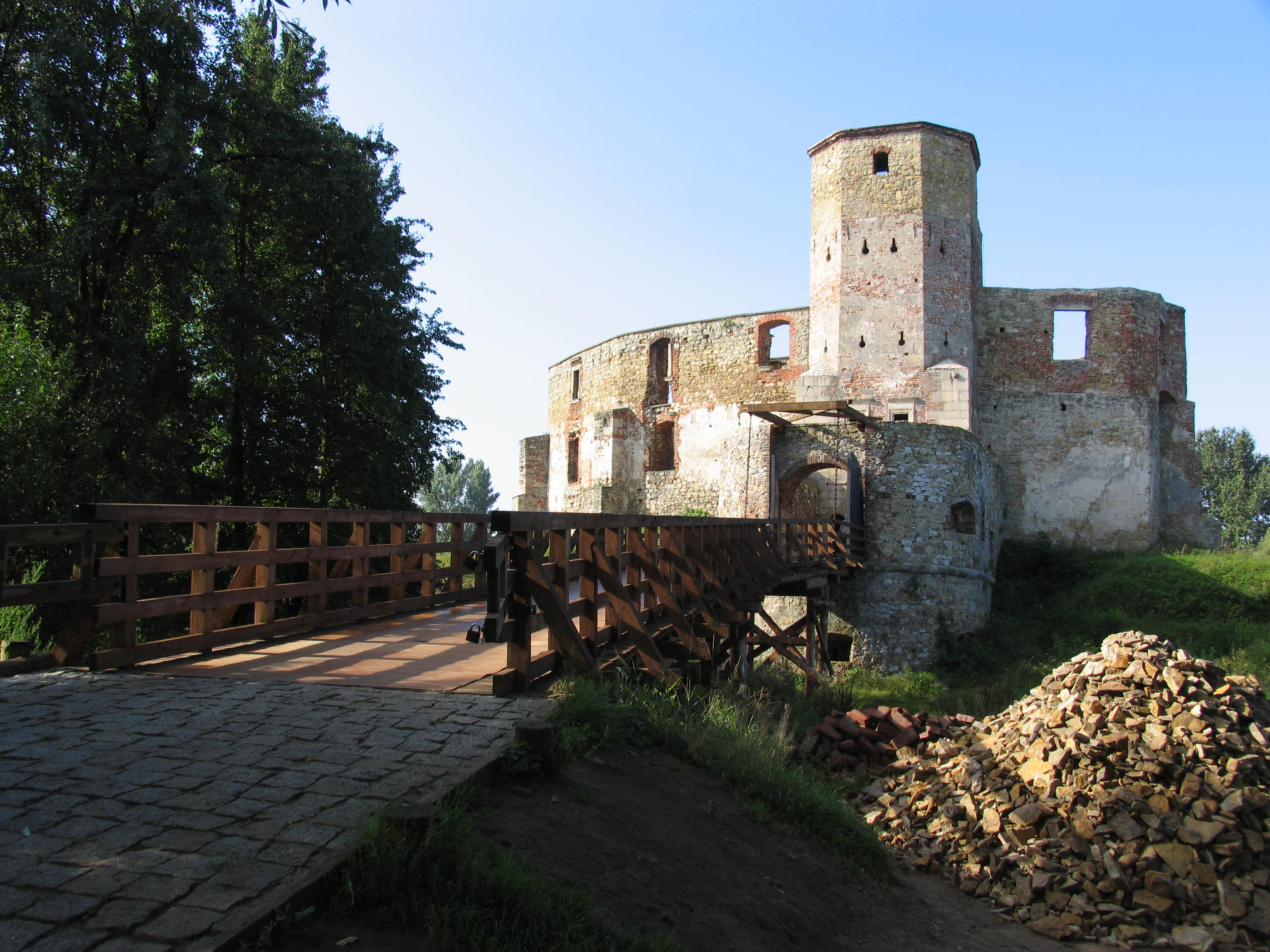 Siewierz, ruiny zamku, XIV, XVI-XVIII